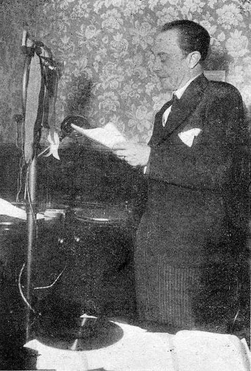 José Rodríguez de Vicente na emisión do programa de radio La Hora Gallega de Radio Patria de Buenos Aires, 1933. fotografía en Vida Gallega